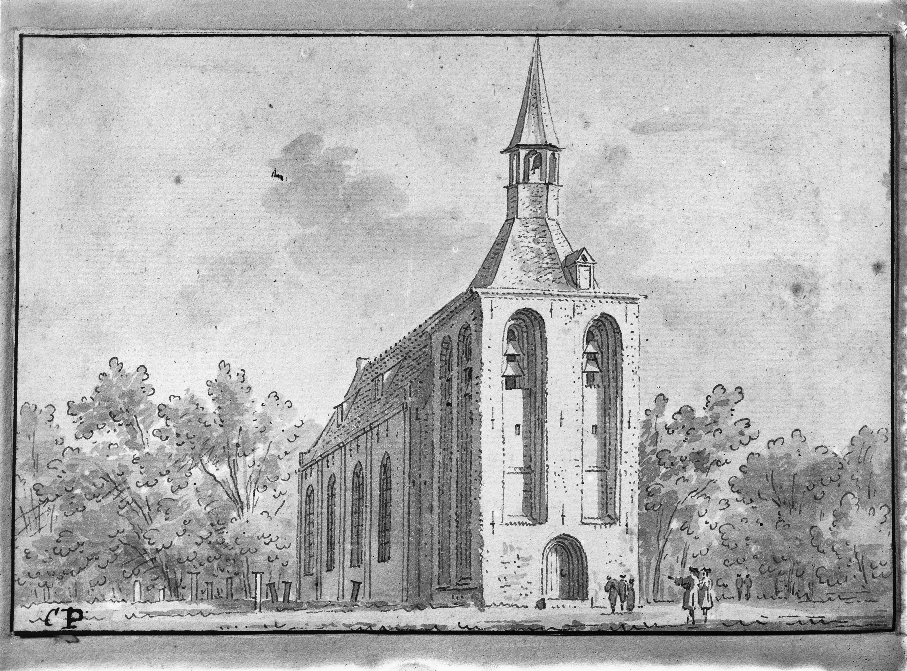 Nederlands Hervormde Kerk: kerk naar tekening van C.Pronk in het Museum Groningen